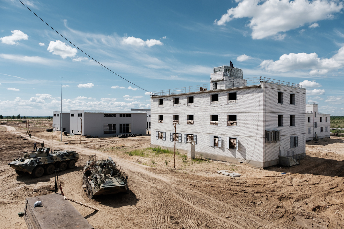 Проверка готовности органов военного управления к боевому применению Министром обороны РФ генералом армии Сергеем Шойгу в рамках сбора руководящего состава Вооруженных Сил (полигон Мулино, Нижегородская обл.)